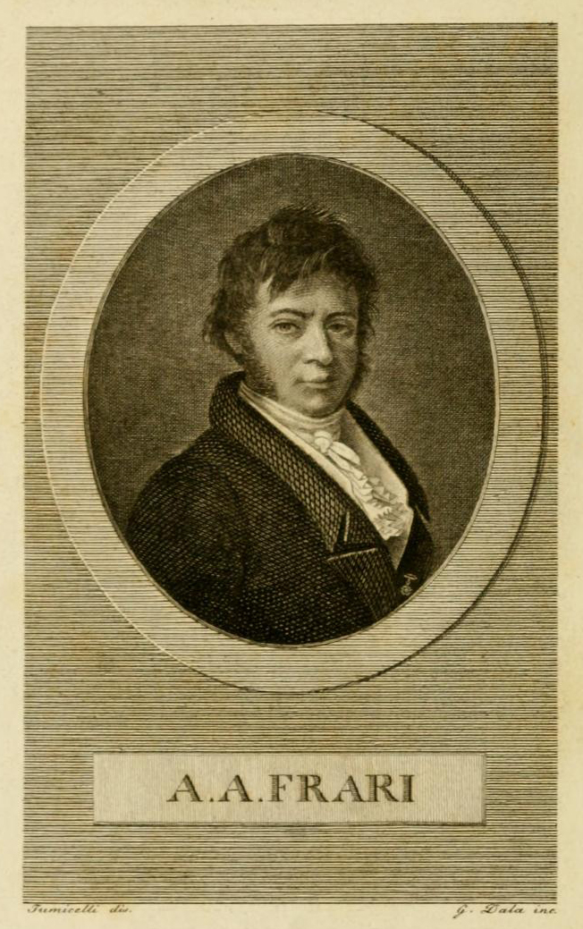 Angelo Antonio Frari (1780-1865)